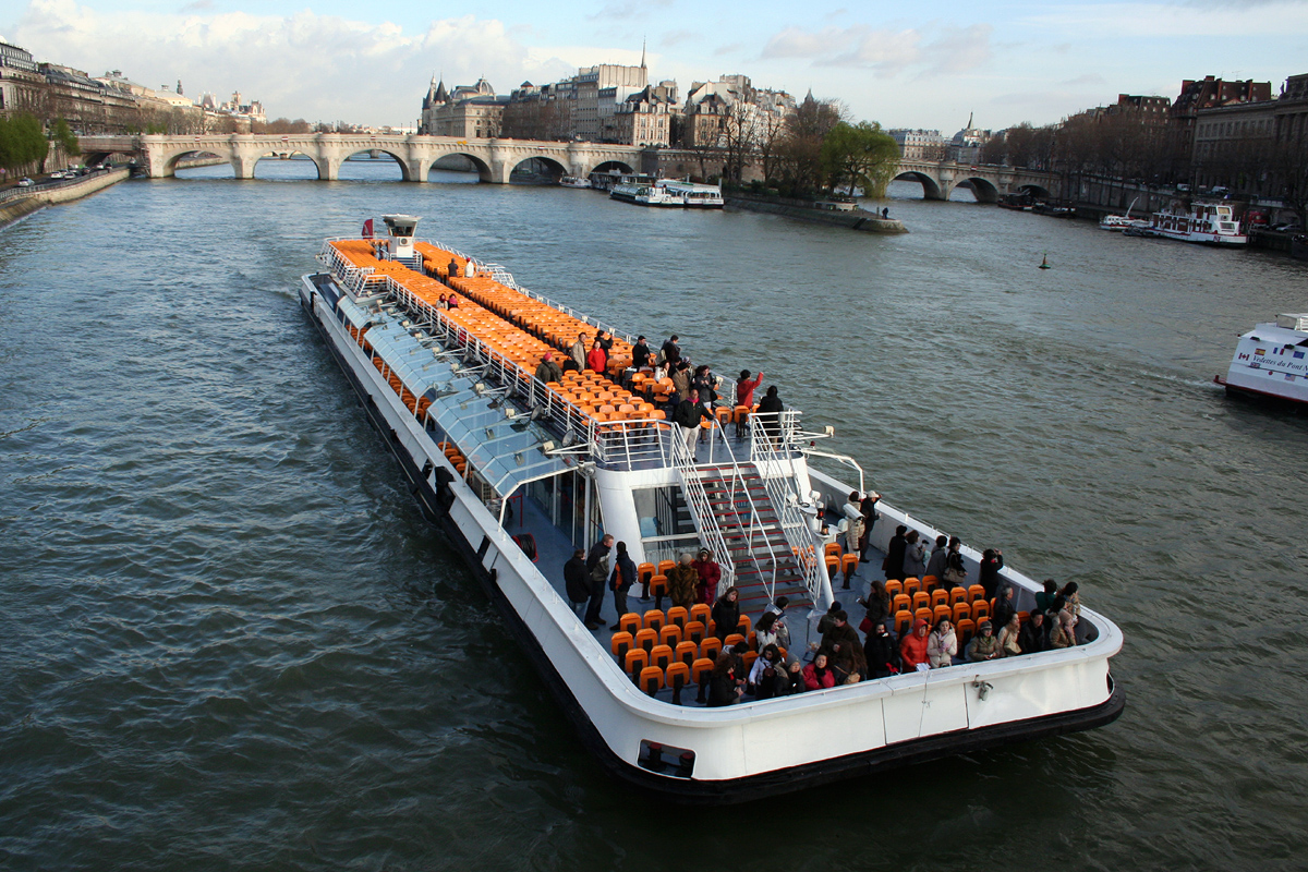 Bateau-promenade La Besogne de la compagnie des Bateaux-Mouches sur la Seine, en aval du Pont Neuf, Paris, France